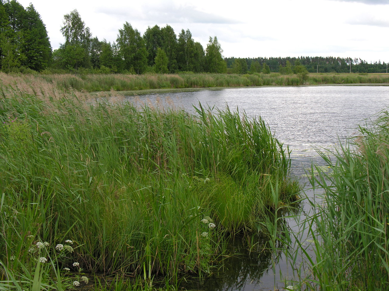 Maigų ežeras, Mažeikių raj. Fotografavo: Algirdas, 2005 m. liepos 22 d.